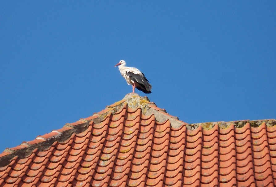 Stork in Ribe, Denmark.